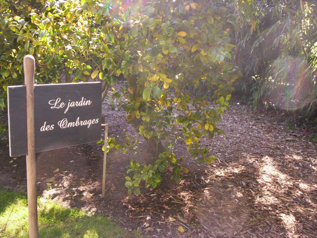 Panneau "Jardin des Ombrages" à l'Arboretum Gaston Allard à Angers